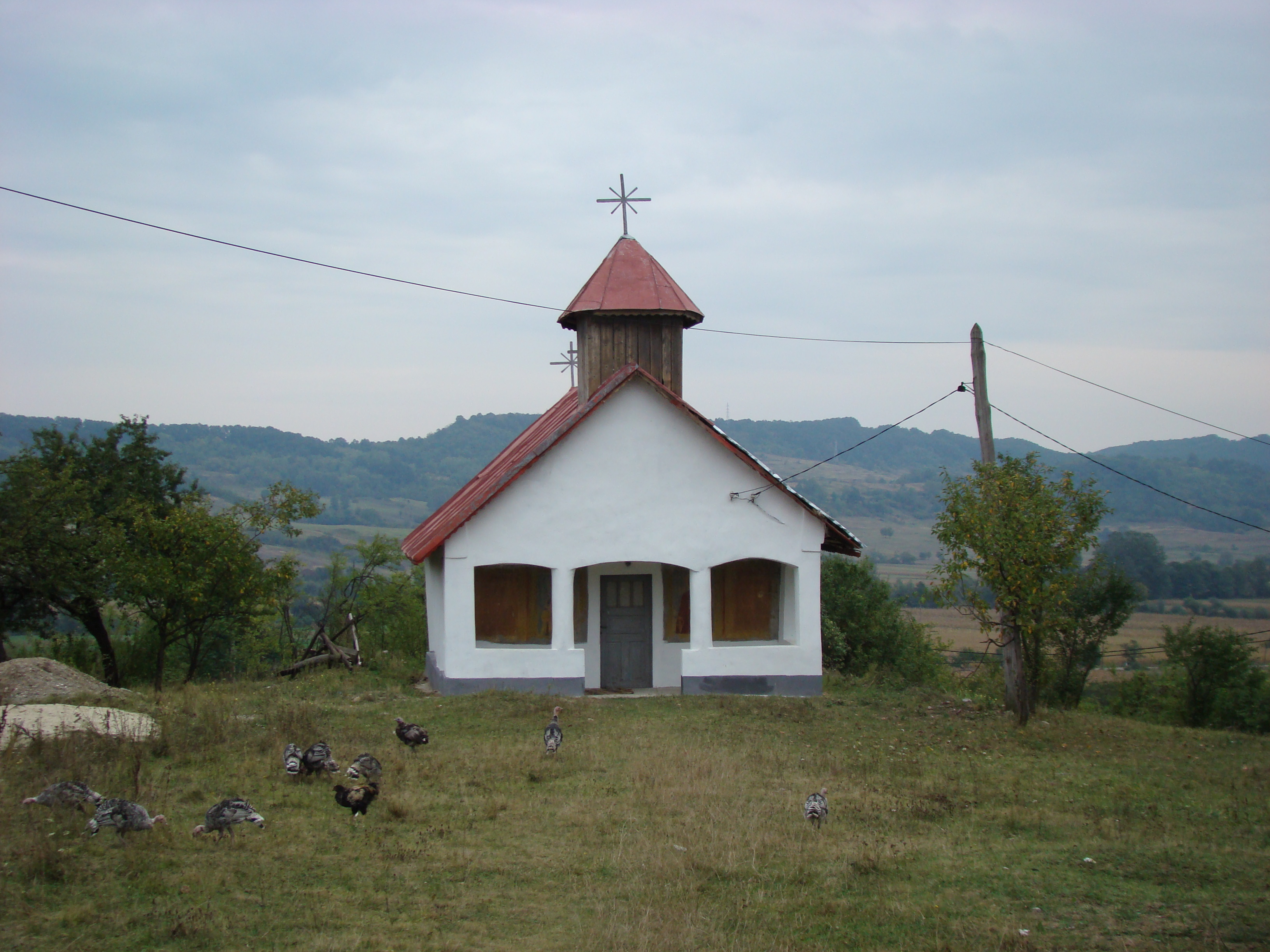 Biserica de lemn „Nașterea Maicii Domnului” Căzănești-Mehedinți